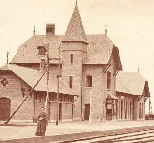 Station Oosterbeek Laag